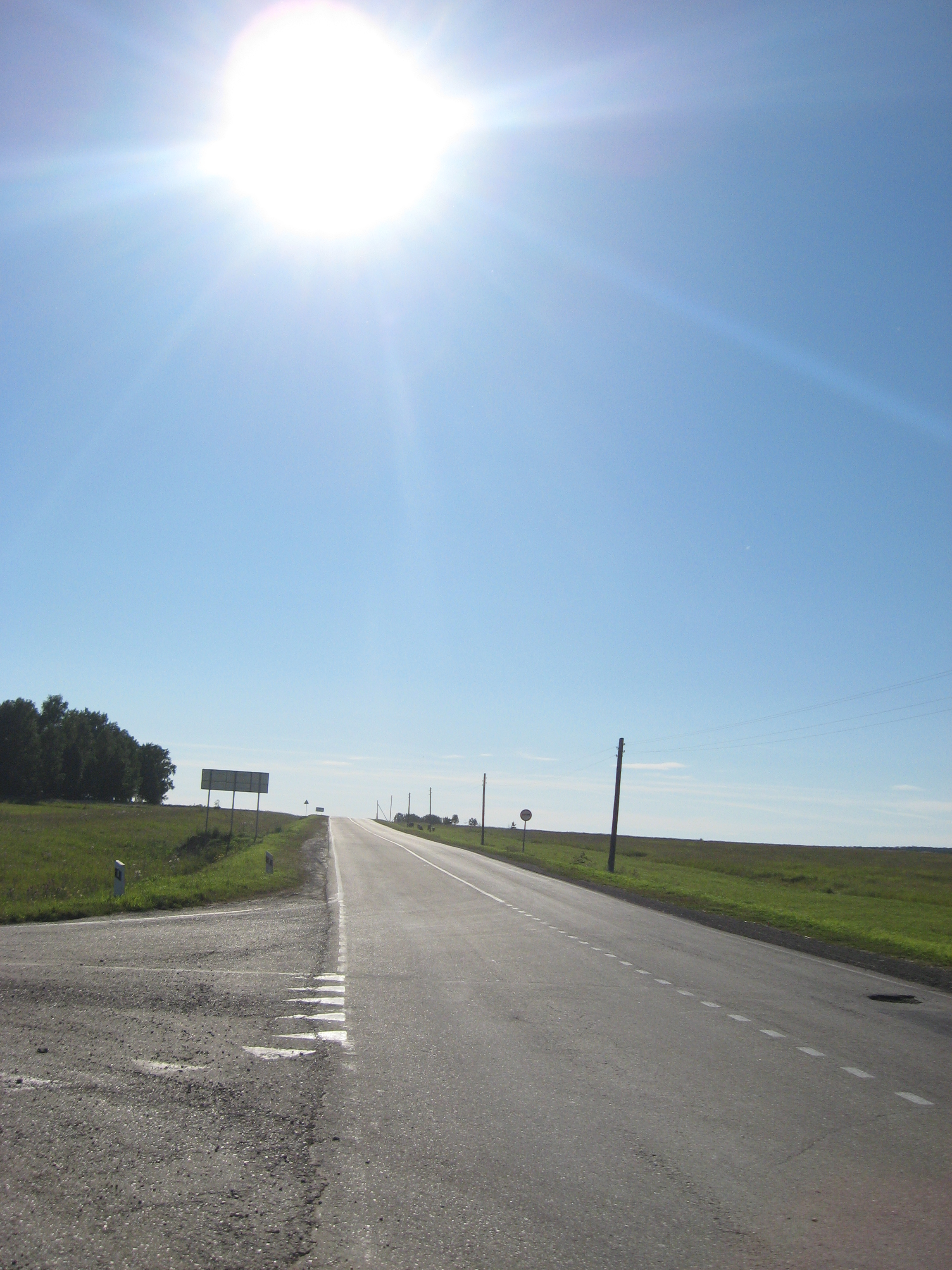 M53 у деревни Трактовая / M53 near Traktovoye